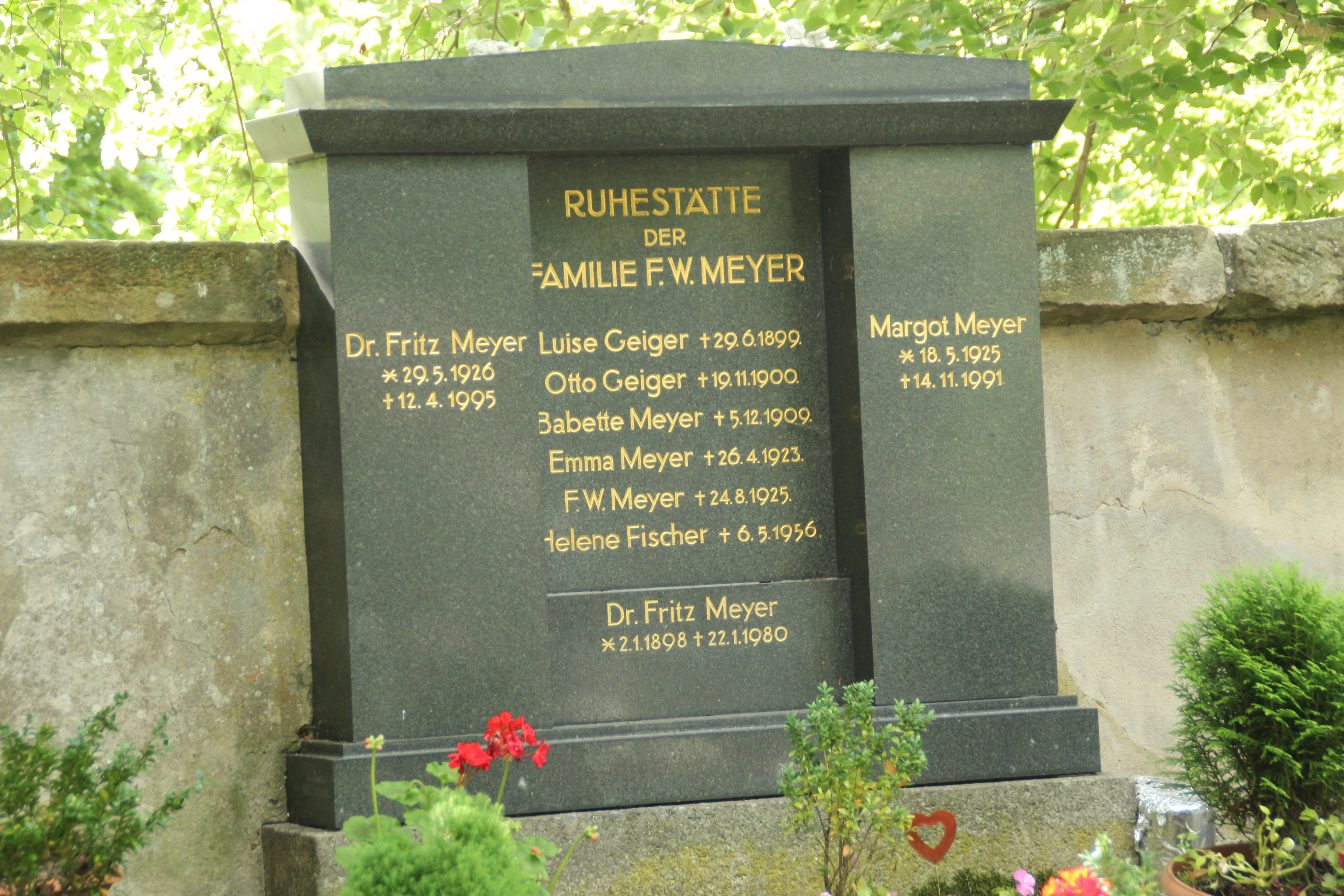 Grabmal Dr.Fritz Meyer Bayreuth (Stadtfriedhof)